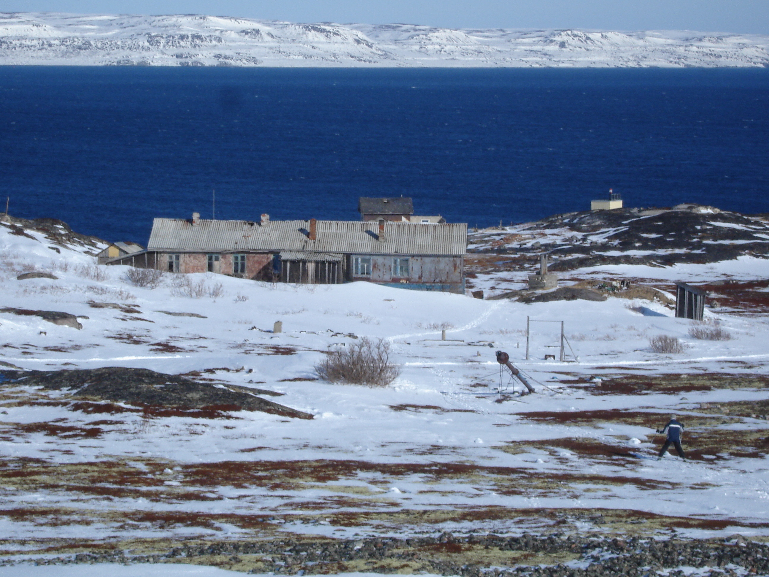 Метеорологическая станция на мысе Пикшуев. 1937-1941, 1954-1995